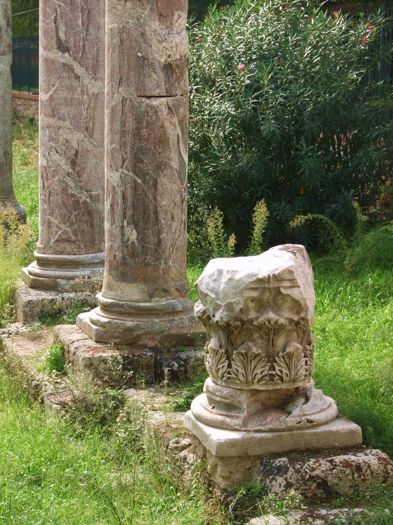 Colonne Greche al Foro Siracusano